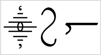 Editorial coronis.